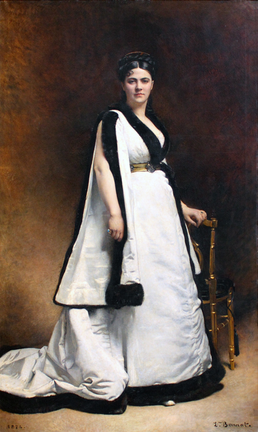 Depicted person: Alix Marie Adélaïde Pasca (1835-1914)